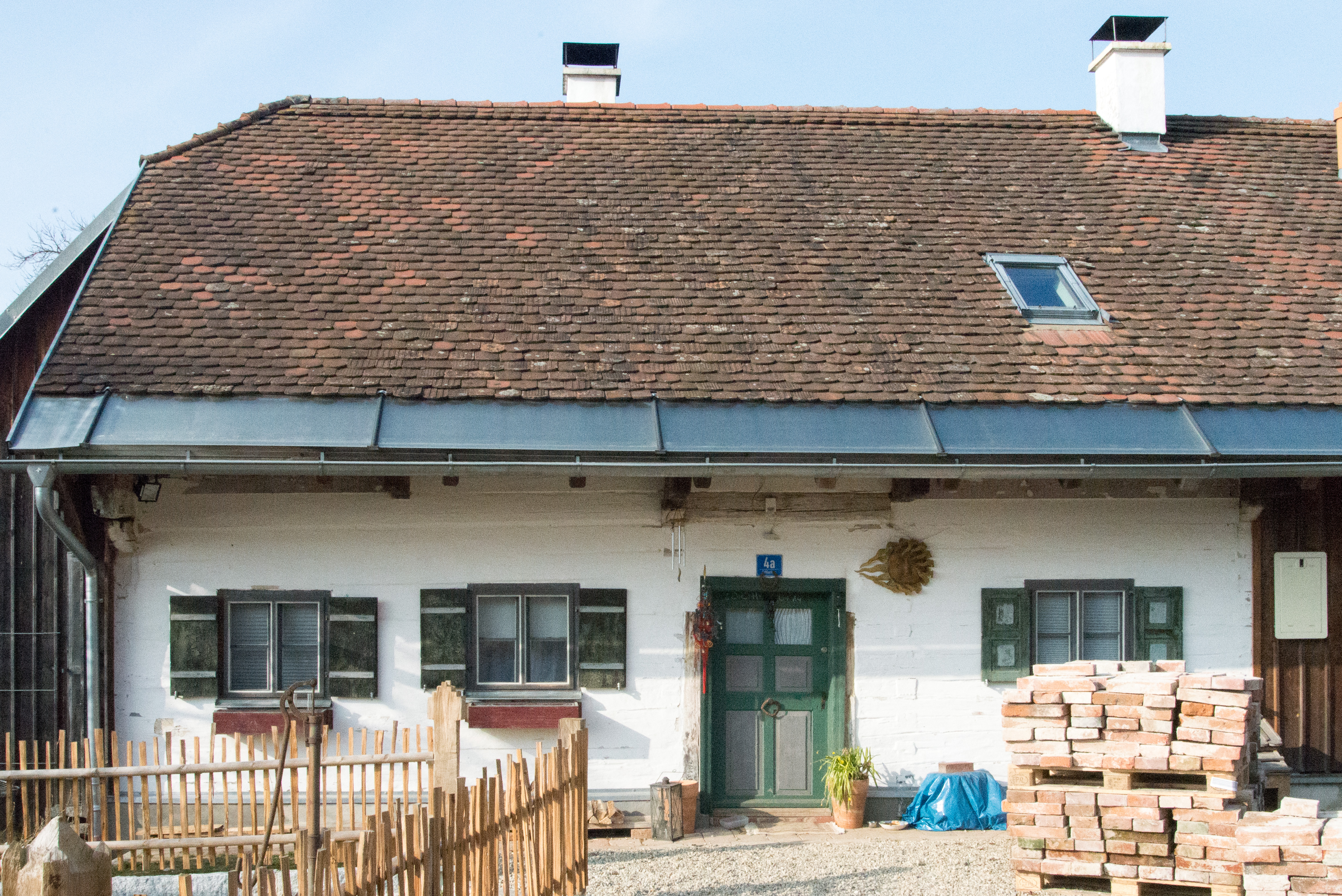 Bauernhaus, eingeschossiges Gebäude mit Krüppelwalmdach, in Blockbauweise, 17. Jahrhundert. This is a photograph of an architectural monument.